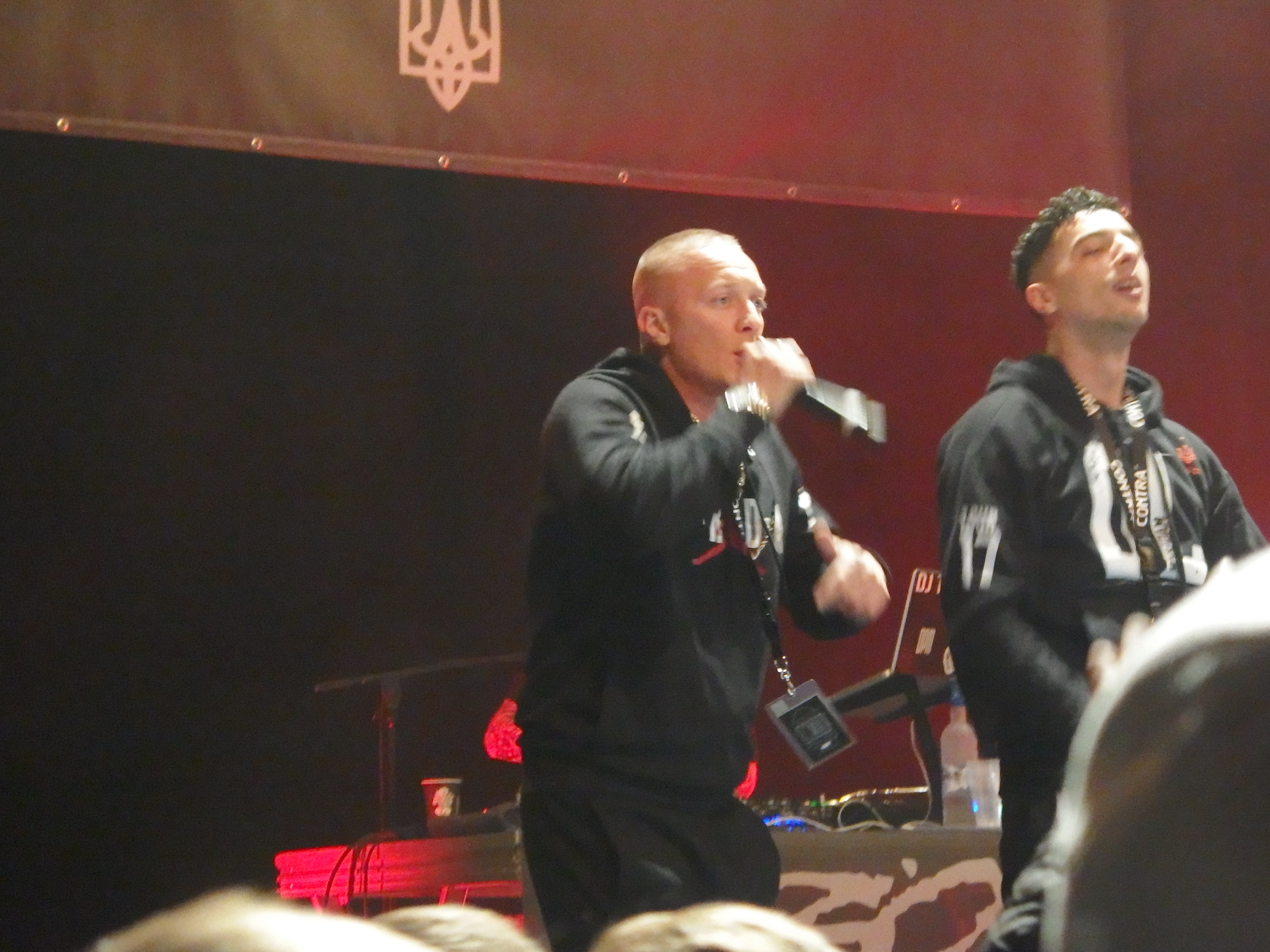 Olexesh mit Backup-Rapper Samir in der Neunkircher Gebläsehalle